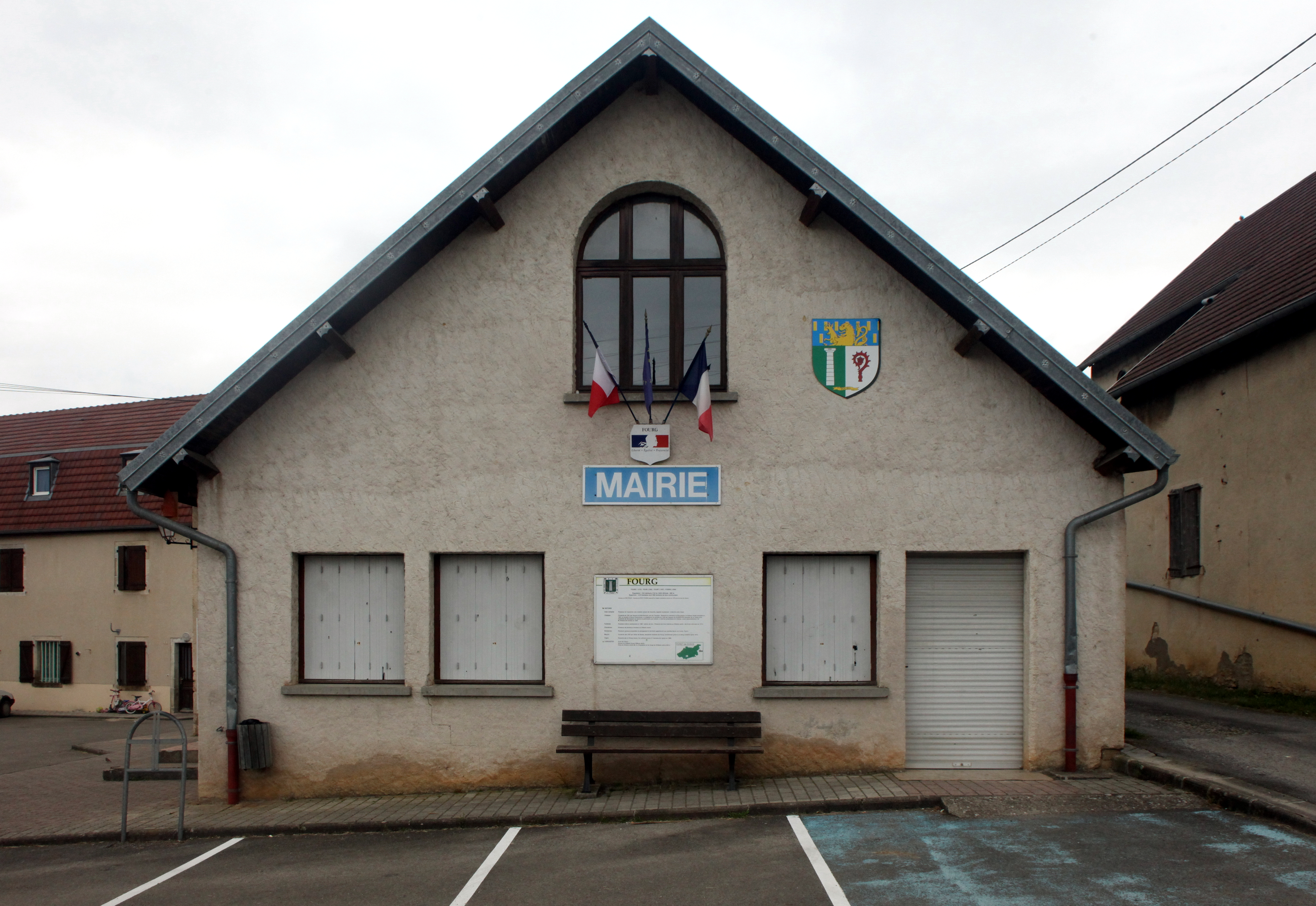 Mairie de Fourg (Doubs).